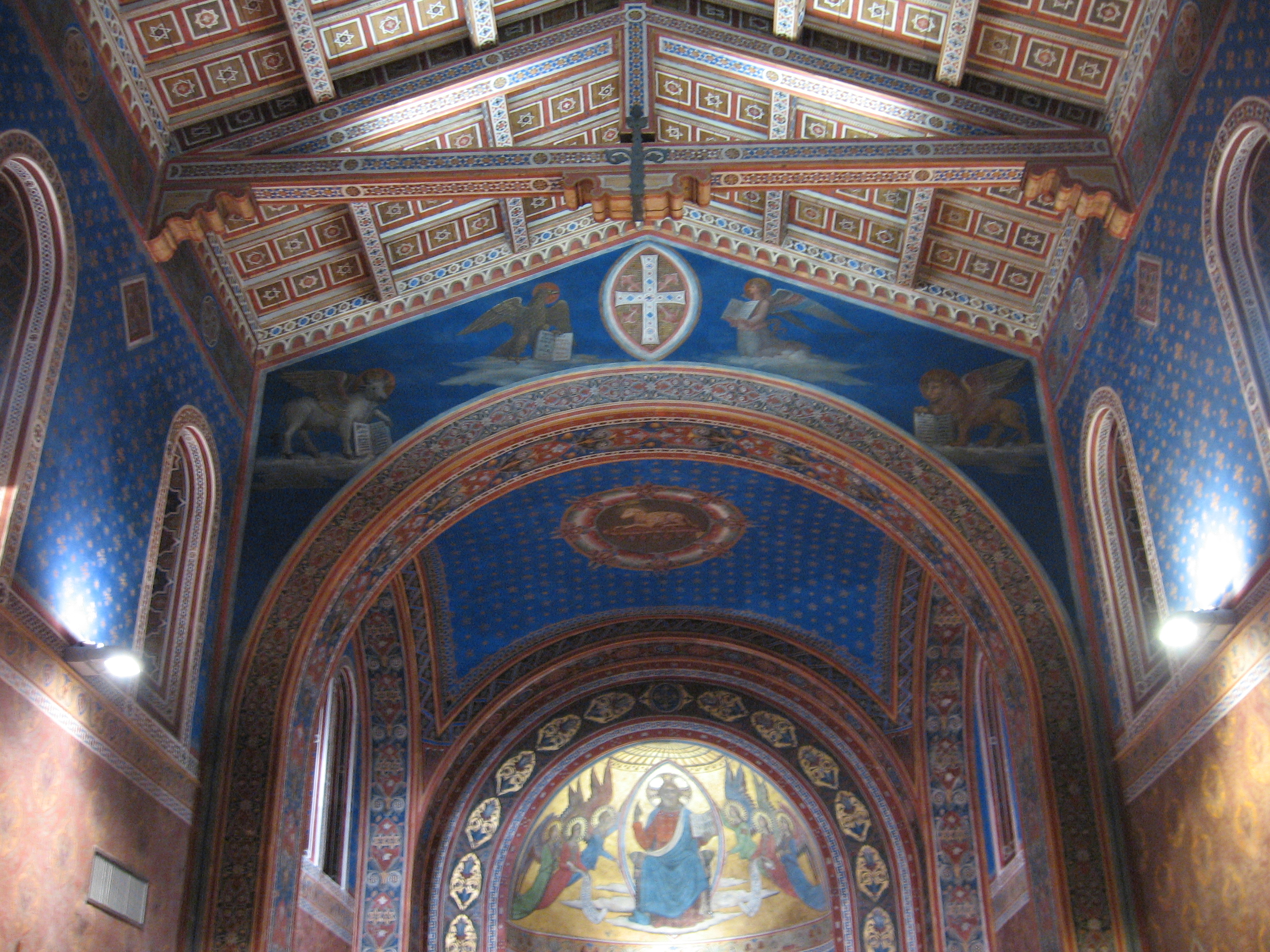 Chiesa di San Costanzo a Perugia - Soffitto